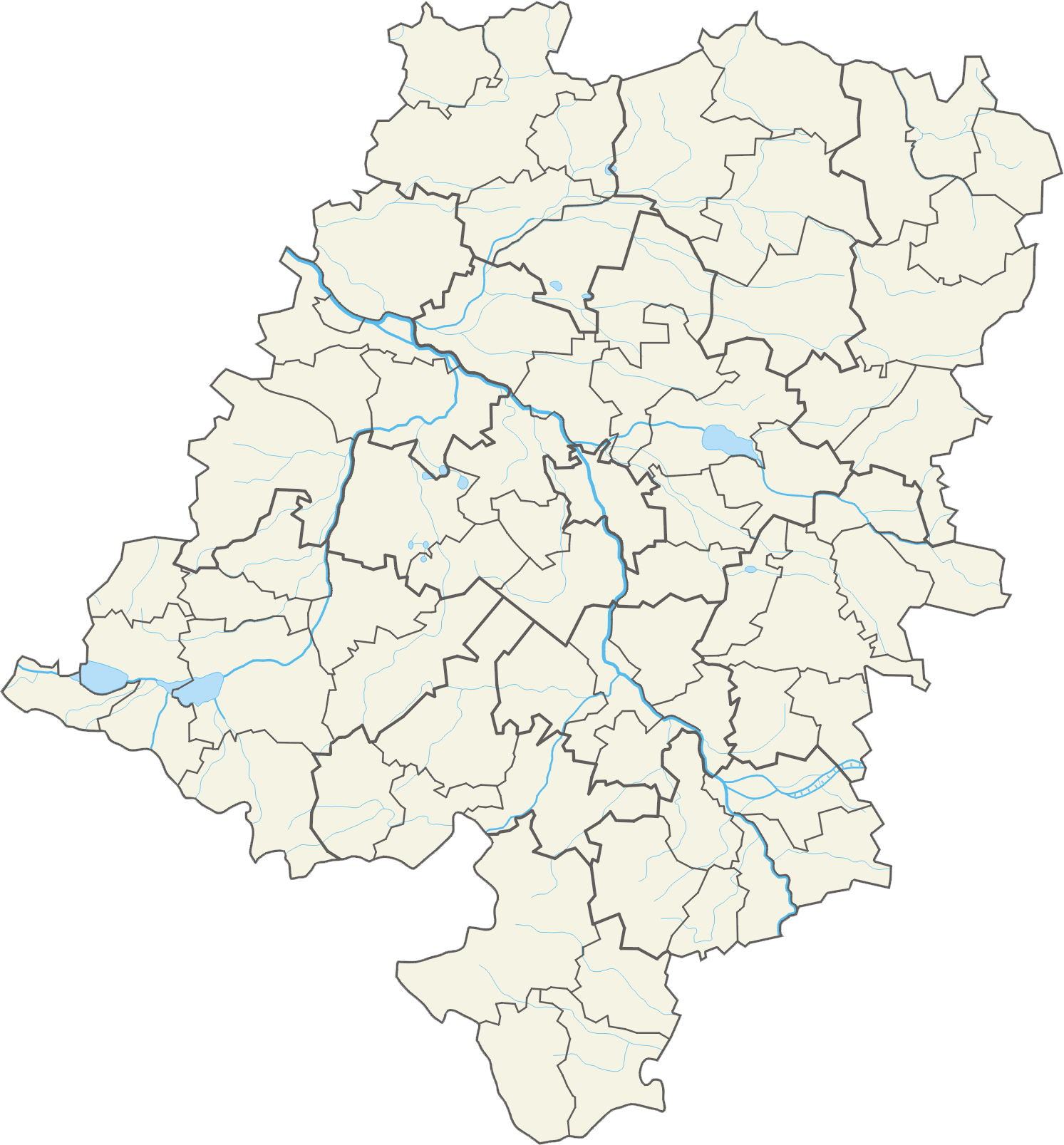 Województwo opolskie – powiaty i gminy Współrzędne graniczne mapy: N: 51.1945° N S: 49.9725° N W: 16.9082° E E: 18.6954° E